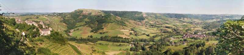 Vue panoramique de Cassagnes Comtaux et Clairvaux